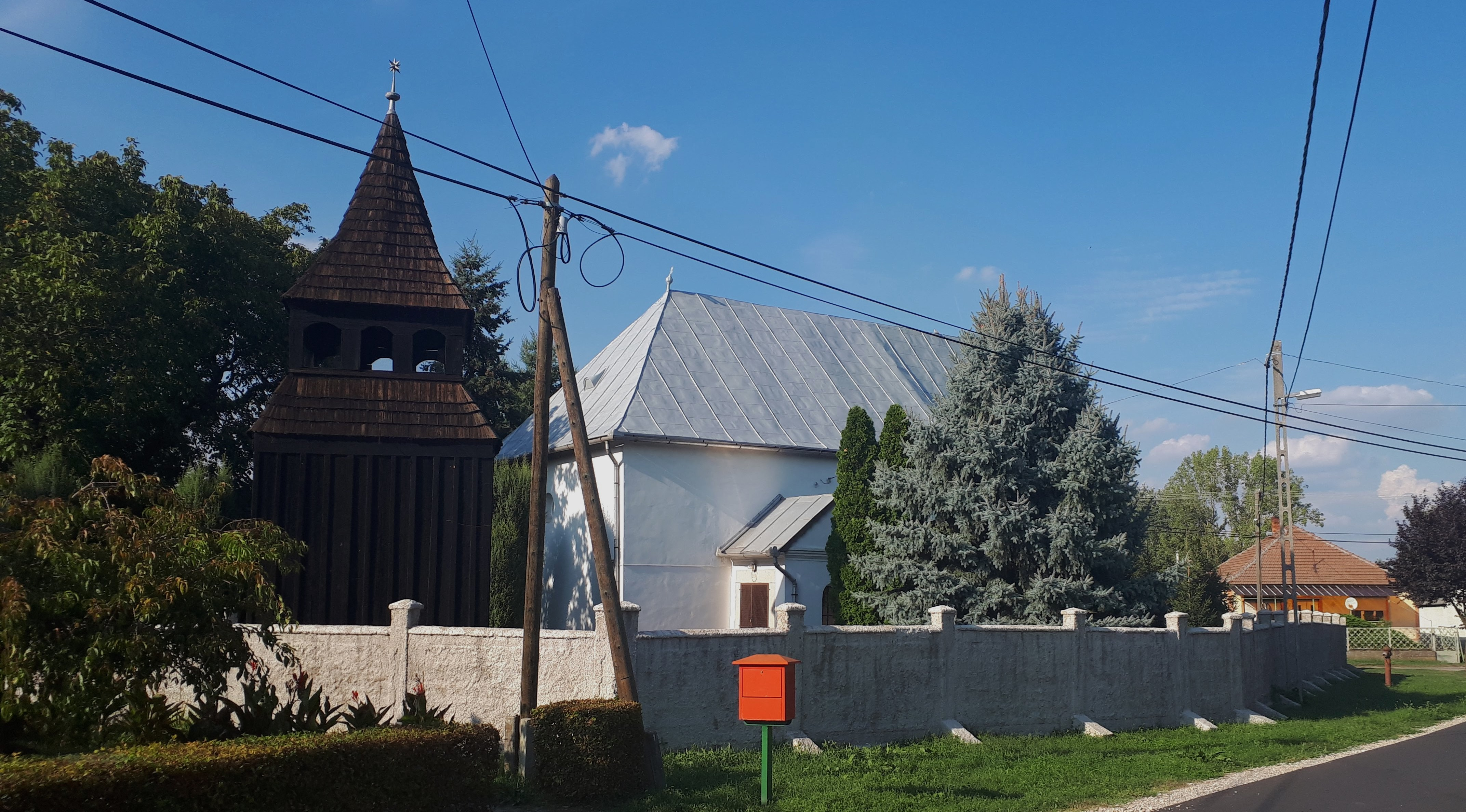 A gótikus, 14. században épült berzéki református templom This is a photo of a monument in Hungary. Identifier: 2667